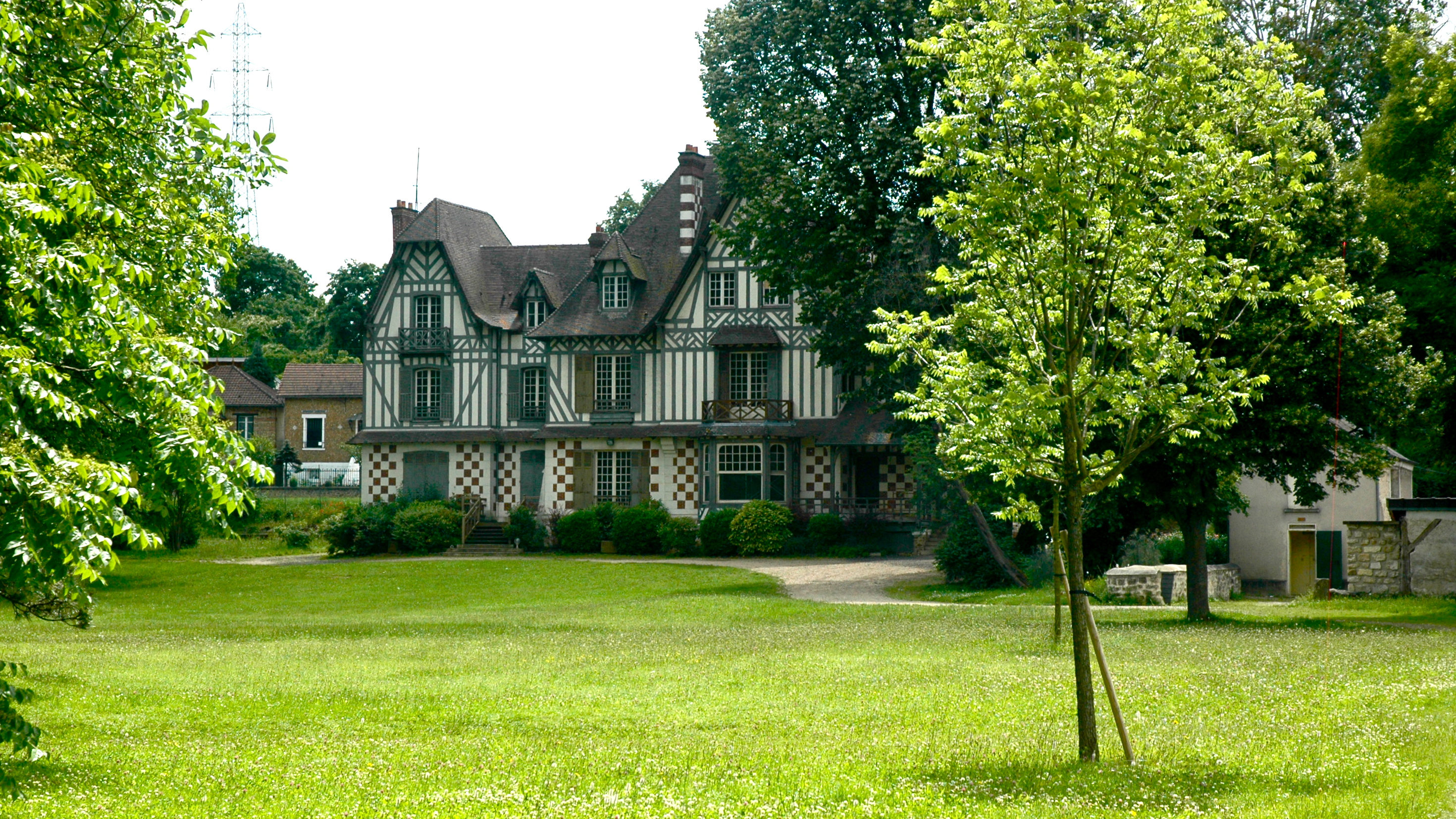 Maison des Buissons, Vernouillet (78)